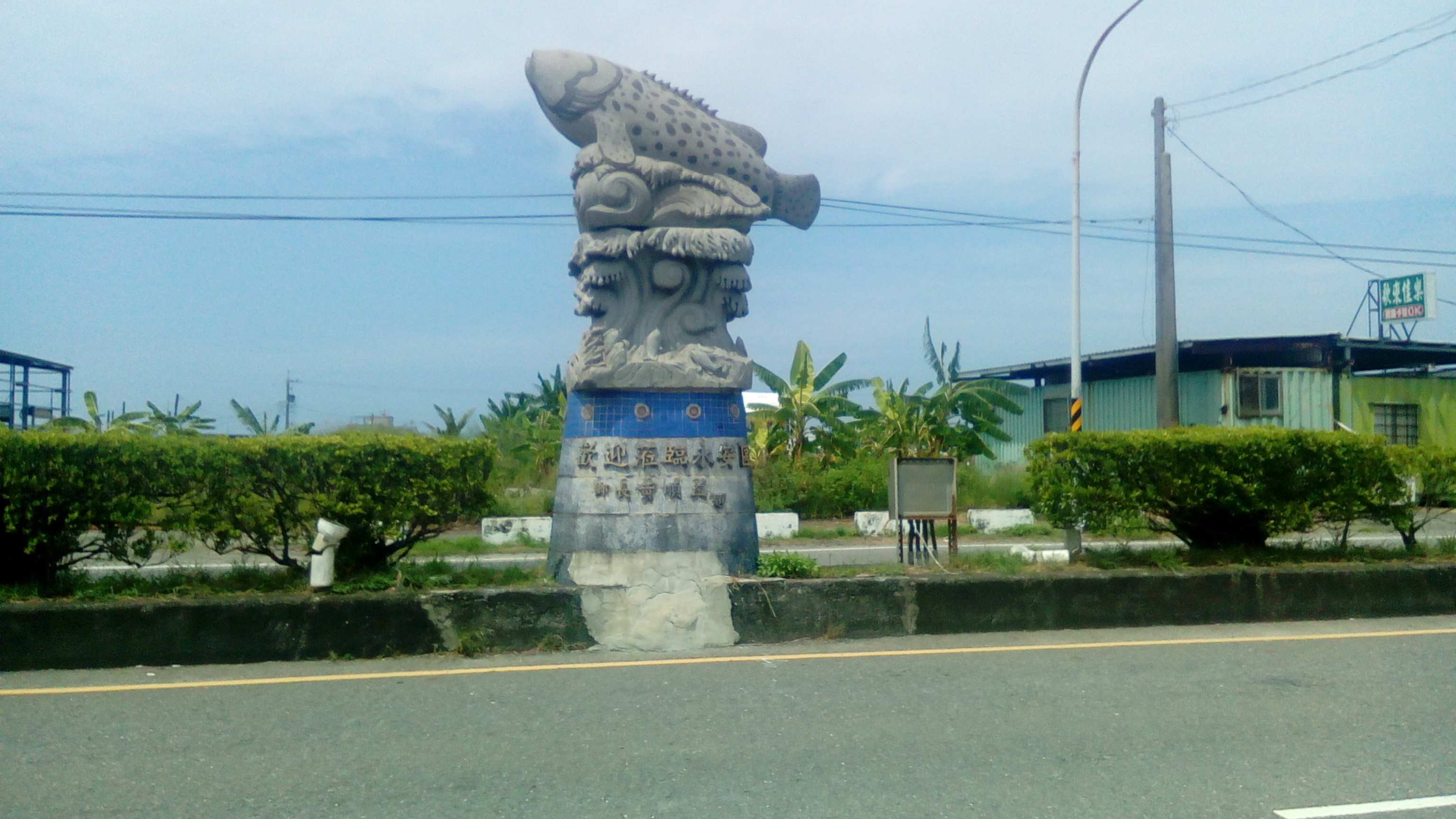 攝於台17線公路上